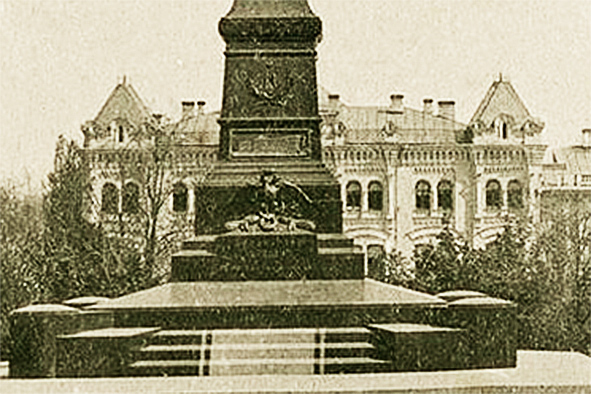 Будинок 1878 року (проєкт архітектора Володимира Ніколаєва). Зруйноване 1913 року. Київ, вул. Терещенківська, 13